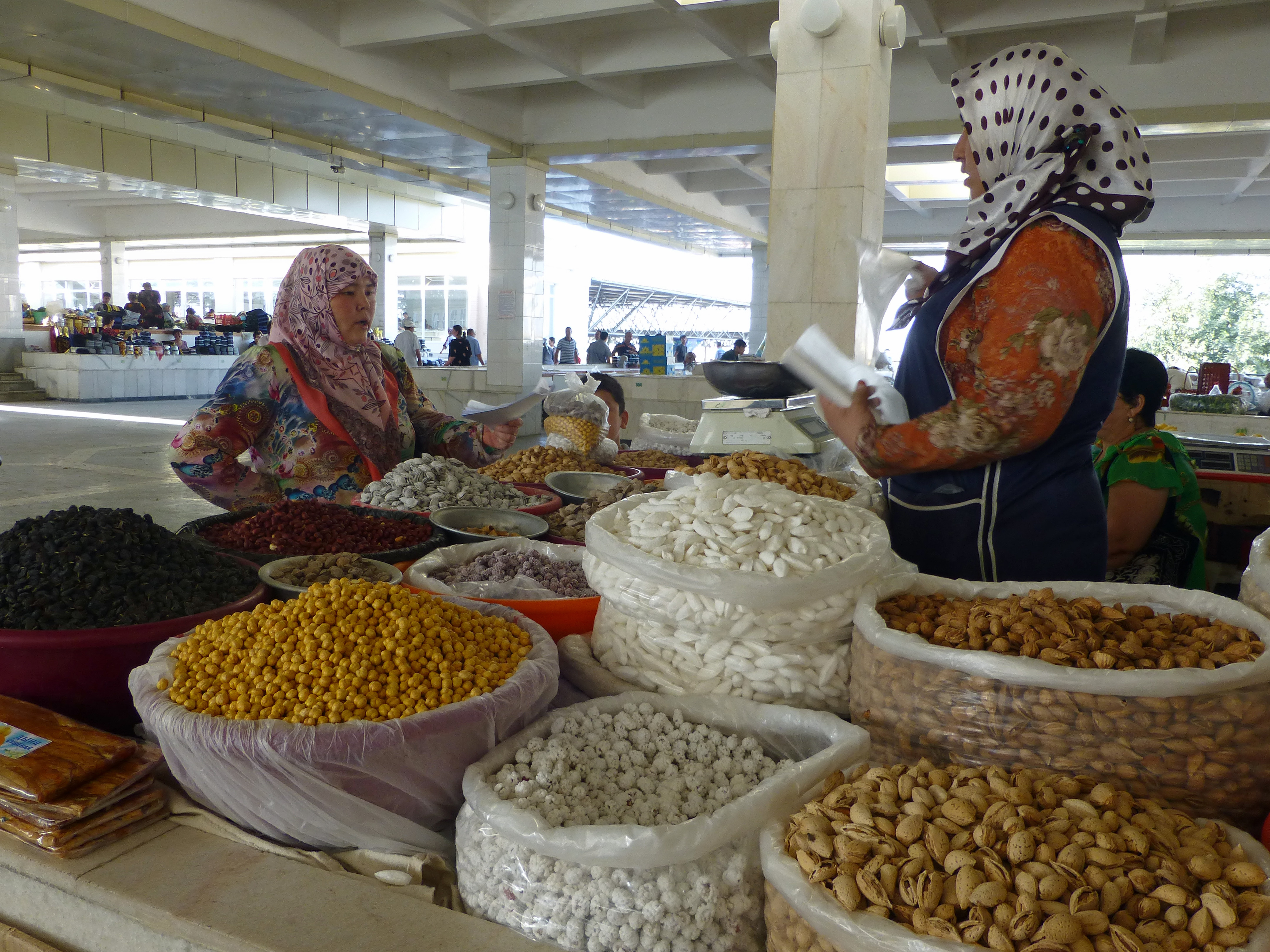 Siyob Bazaar, le grand marché de Samarcande (Ouzbékistan)